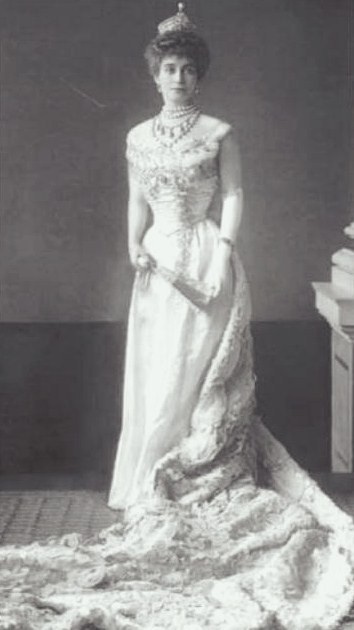 Княгиня Екатерина Васильевна Энгель фон-Доннельсмарк, ур. Слепцова (1862—1929), в первом браке Муравьева.